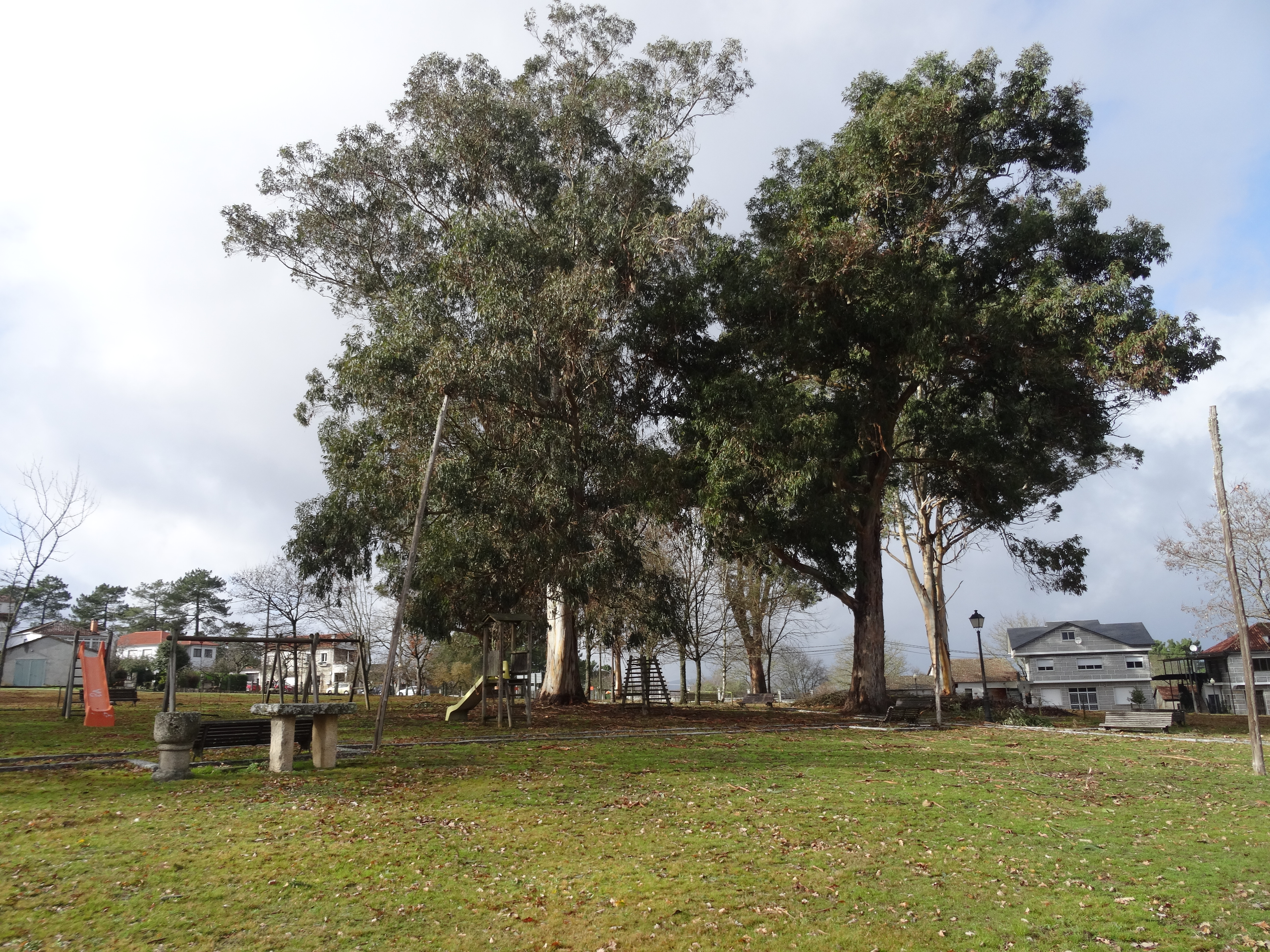 Ver título.